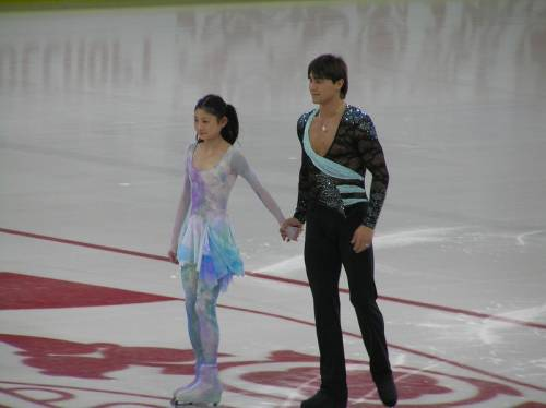 Alexander Smirnov & Yuko Kawaguchi